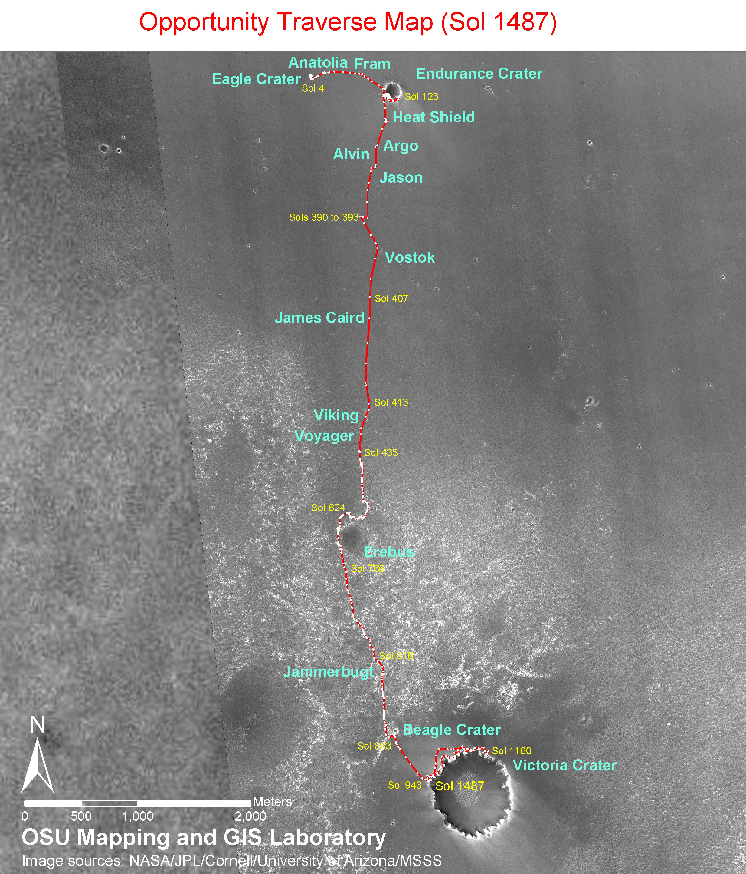 Opportunity rover sol 1487 traverse map.